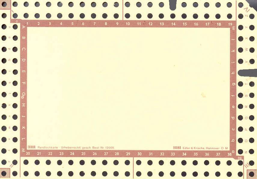 Randlochkarte mit zwei Schlitzungen (handgemalt)